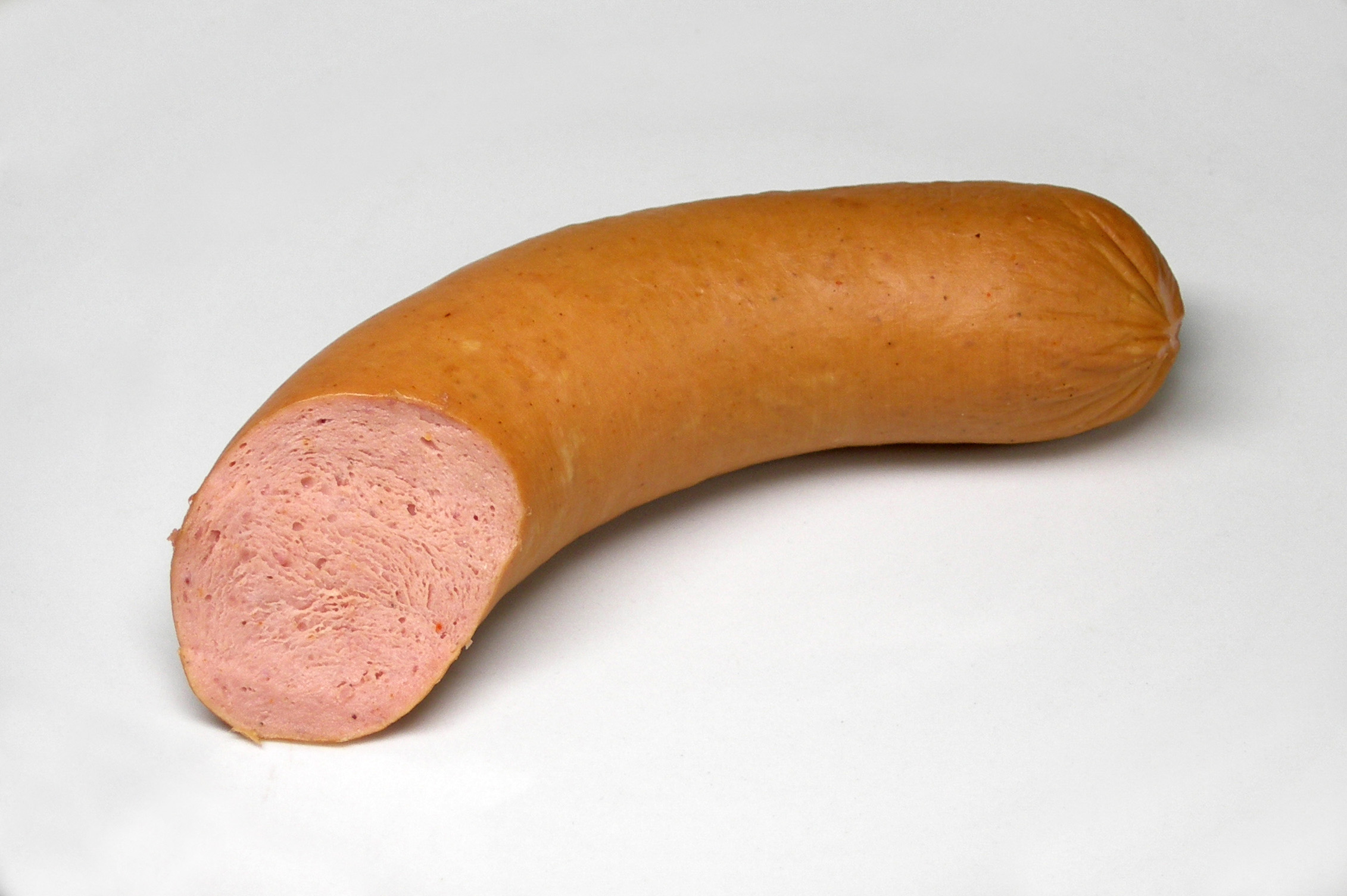 Lyoner oder Fleischwurst. Eigene Aufnahme